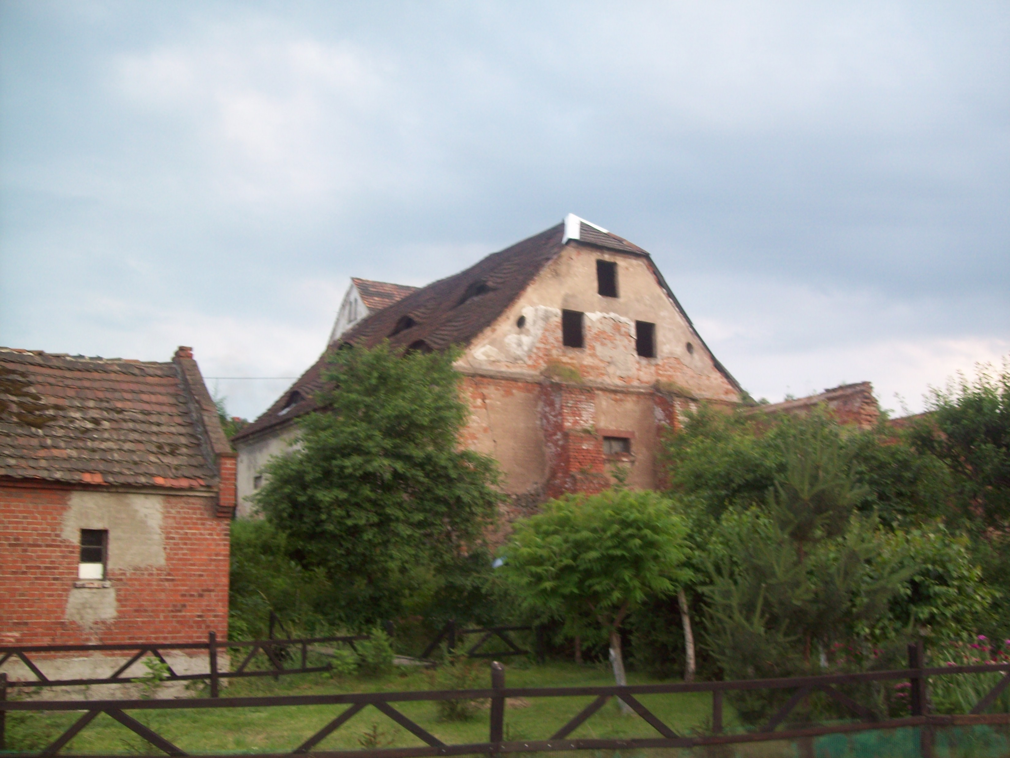 Stary folwark przy Półwiejskiej w Kłodzku